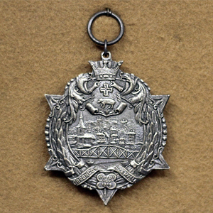 Odznaka Gwiazda Przemyśla